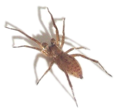 Aysha velox male